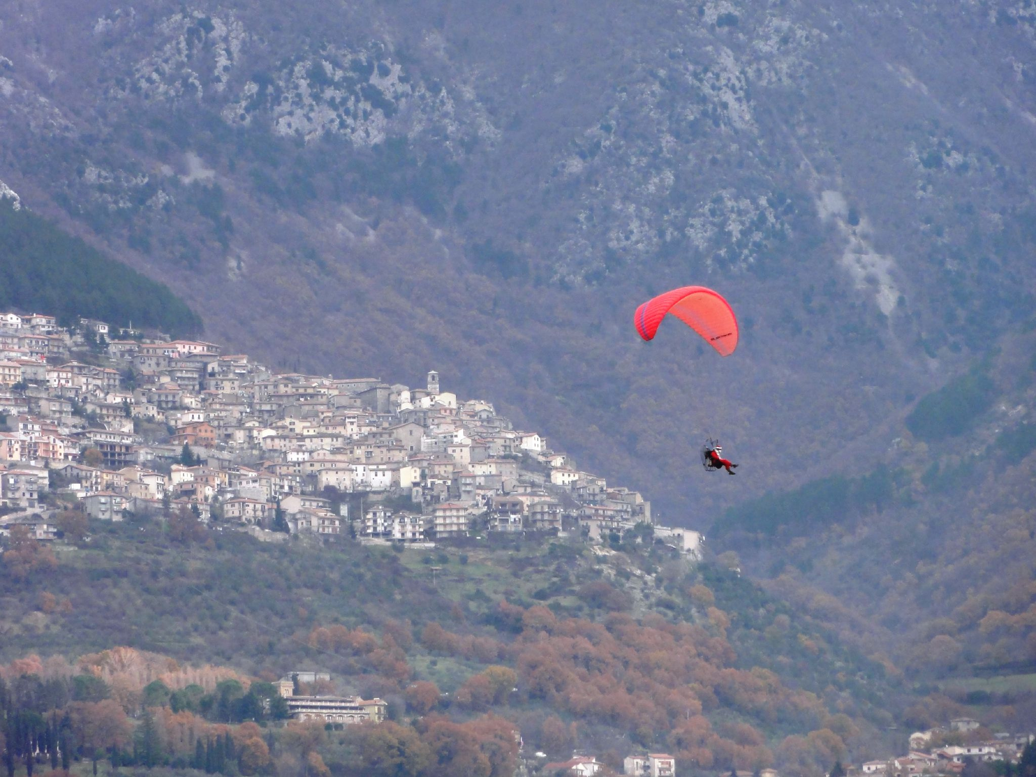 Un parapendio in volo dalla montagna dove sorge Poggio Bustone (provincia di Rieti, Lazio) in discesa verso la Piana Reatina